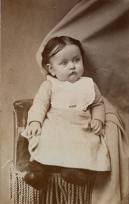 Анонимный фотограф, Великобритания, II половина XIX века. Скрывающаяся мать